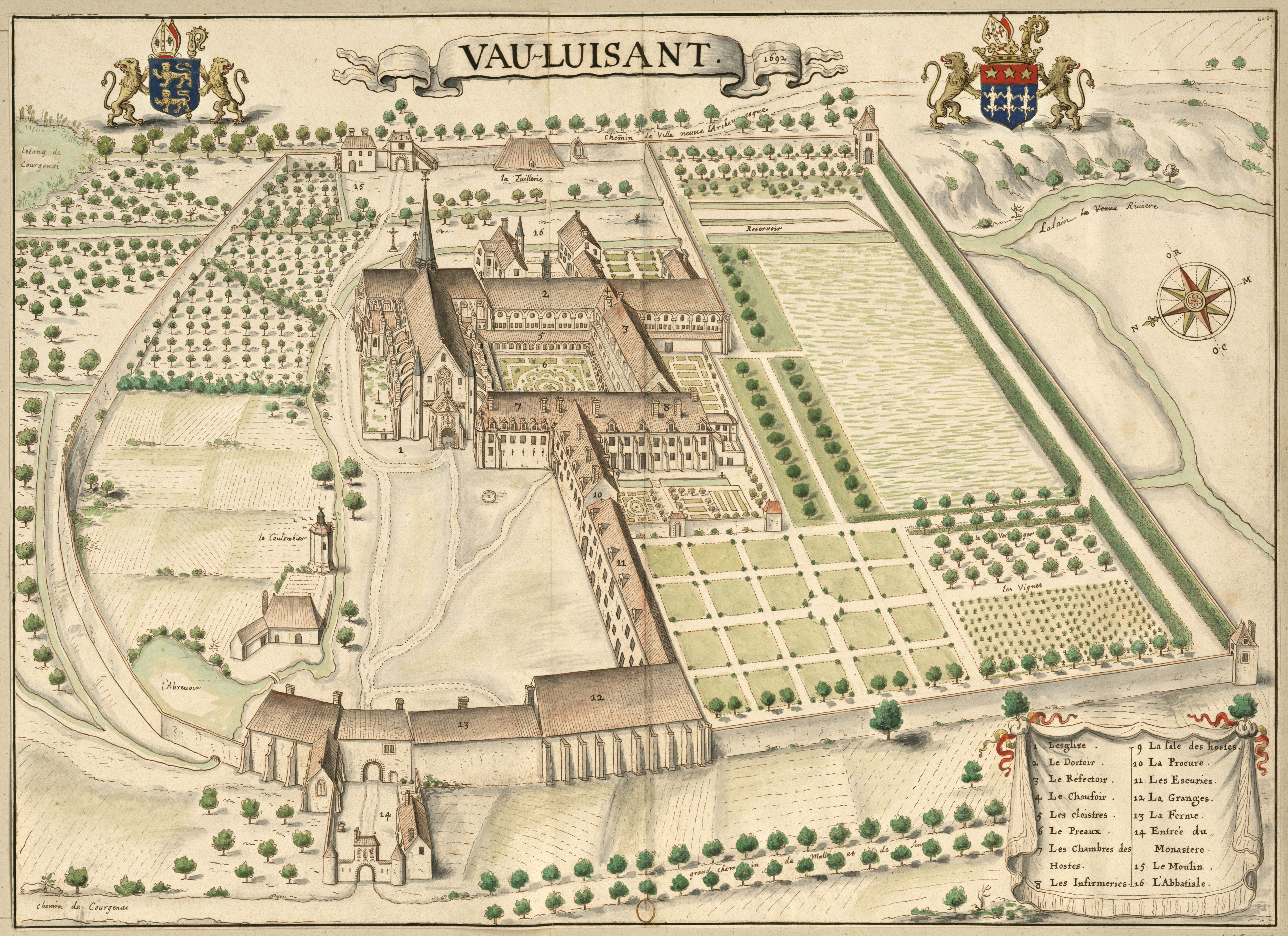 Vauluisant, 1692 : [dessin] / [Louis Boudan?]